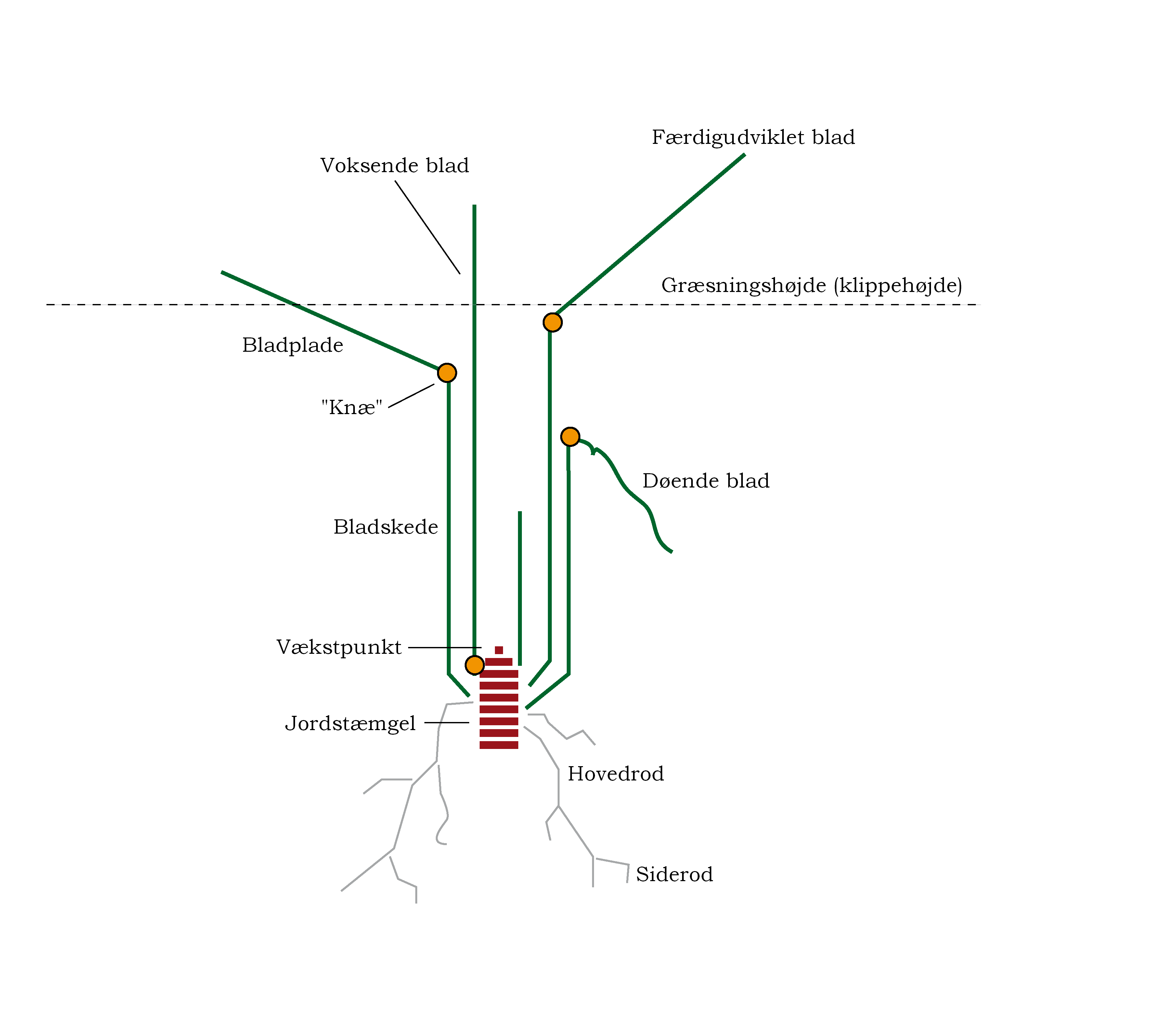 Skematisk fremstilling af en græsplante